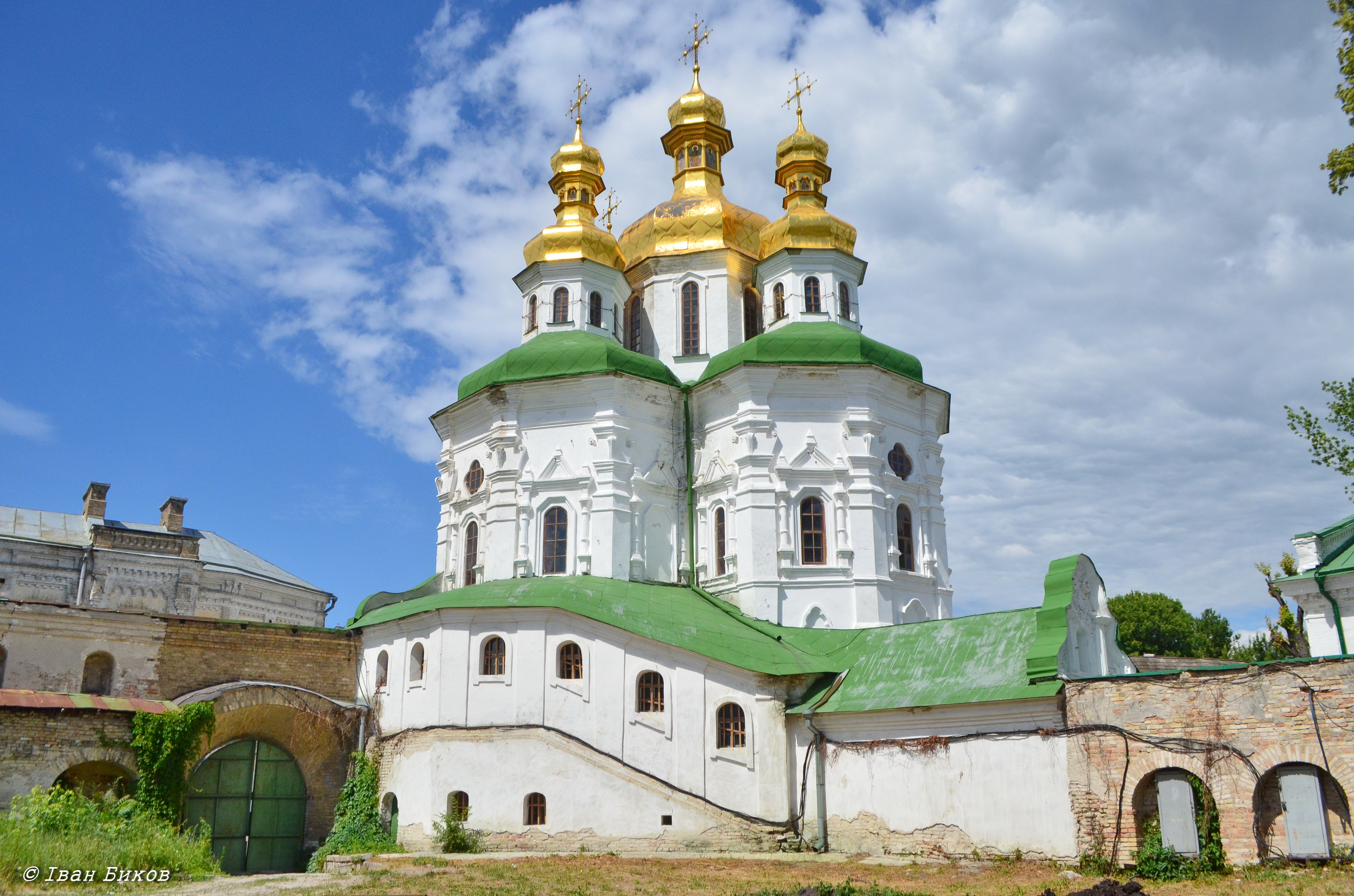 Всіхсвятська церква у Києво-Печерській лаврі. Збудована Іваном Мазепою у 1696—1698 роках в стилі українського бароко